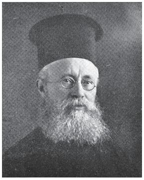 Иван Шишков.